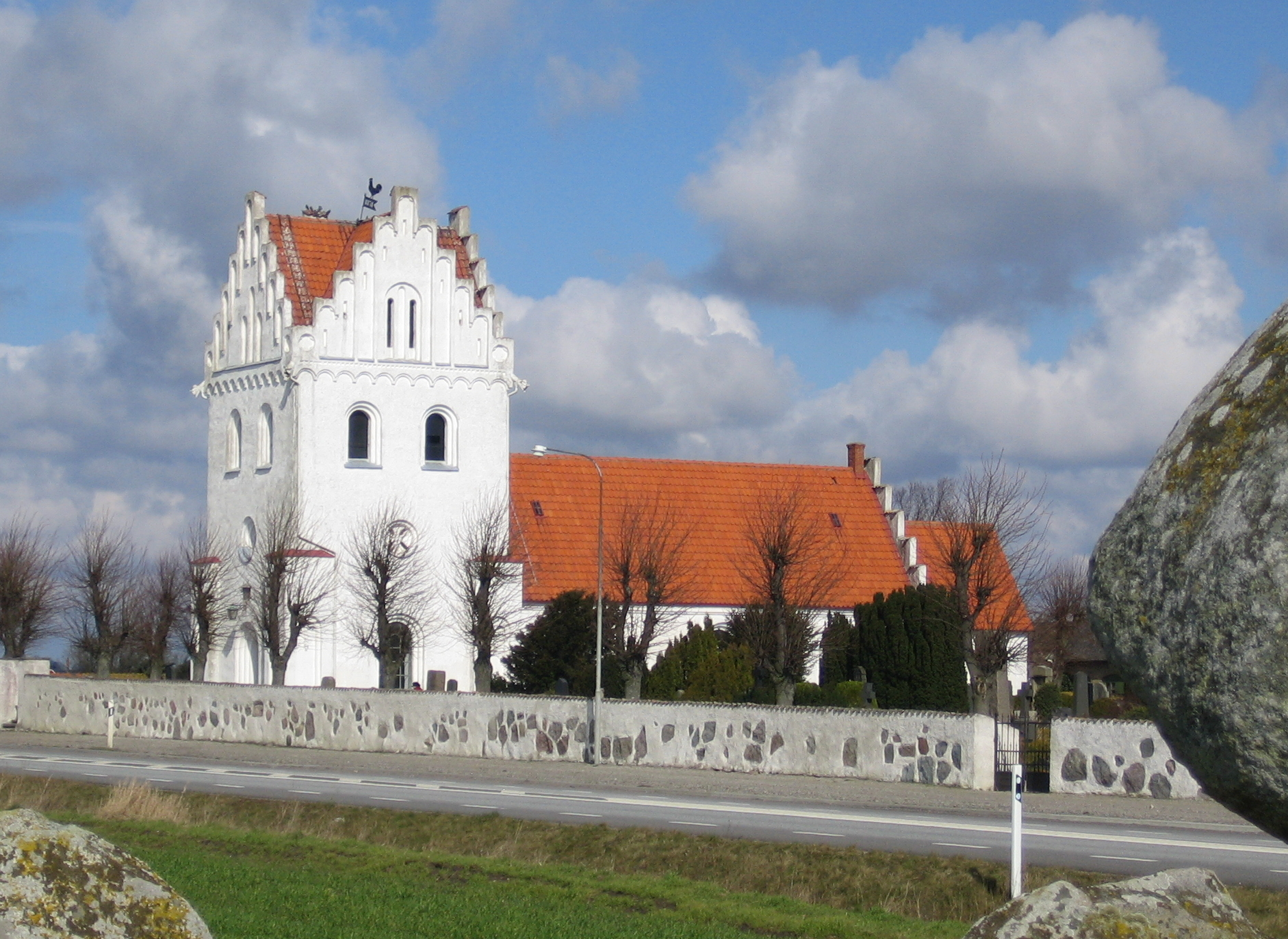 Skegrie kyrka in Skåne, Sweden